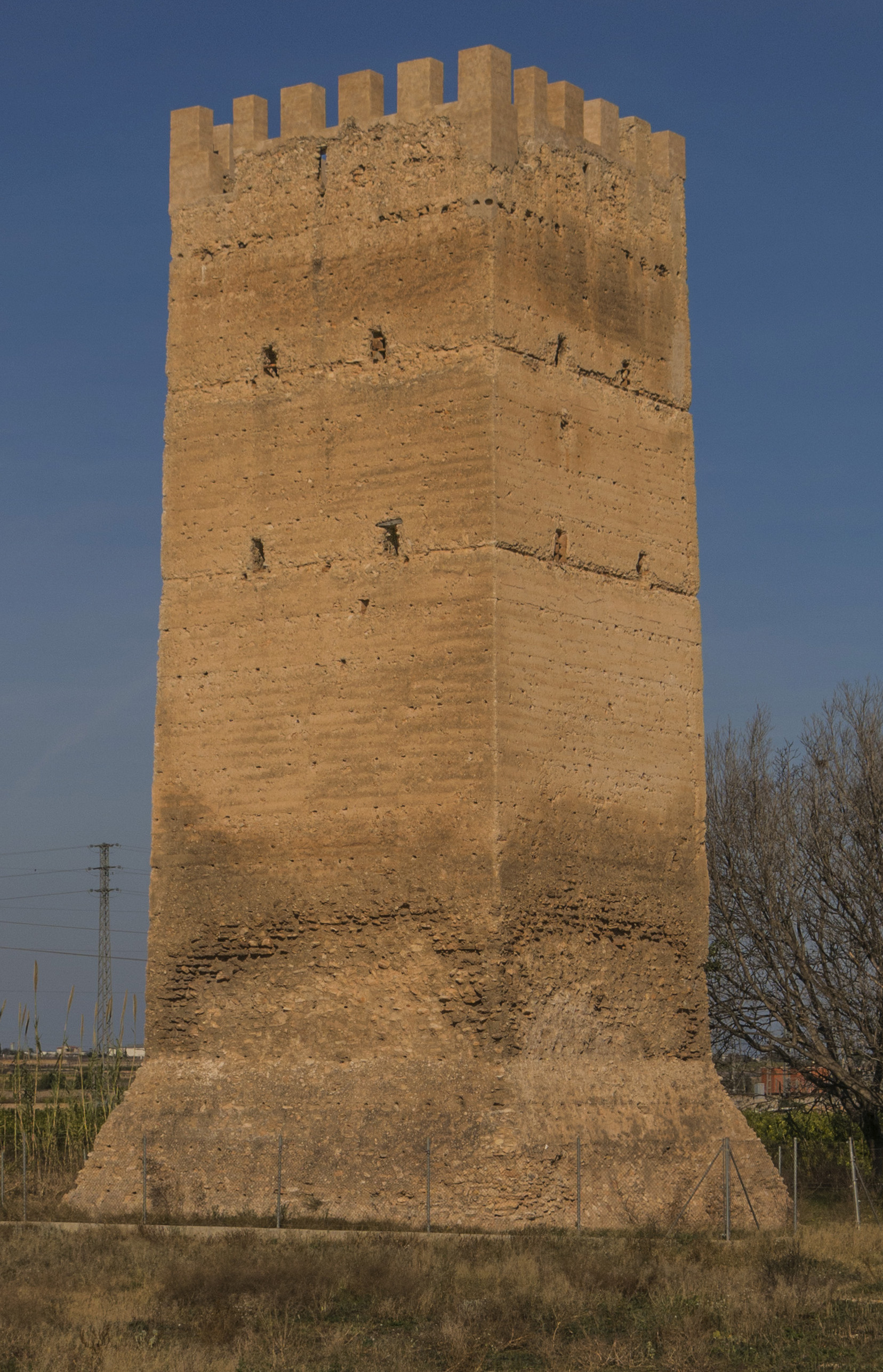 És una construcció d'arquitectura islàmica.